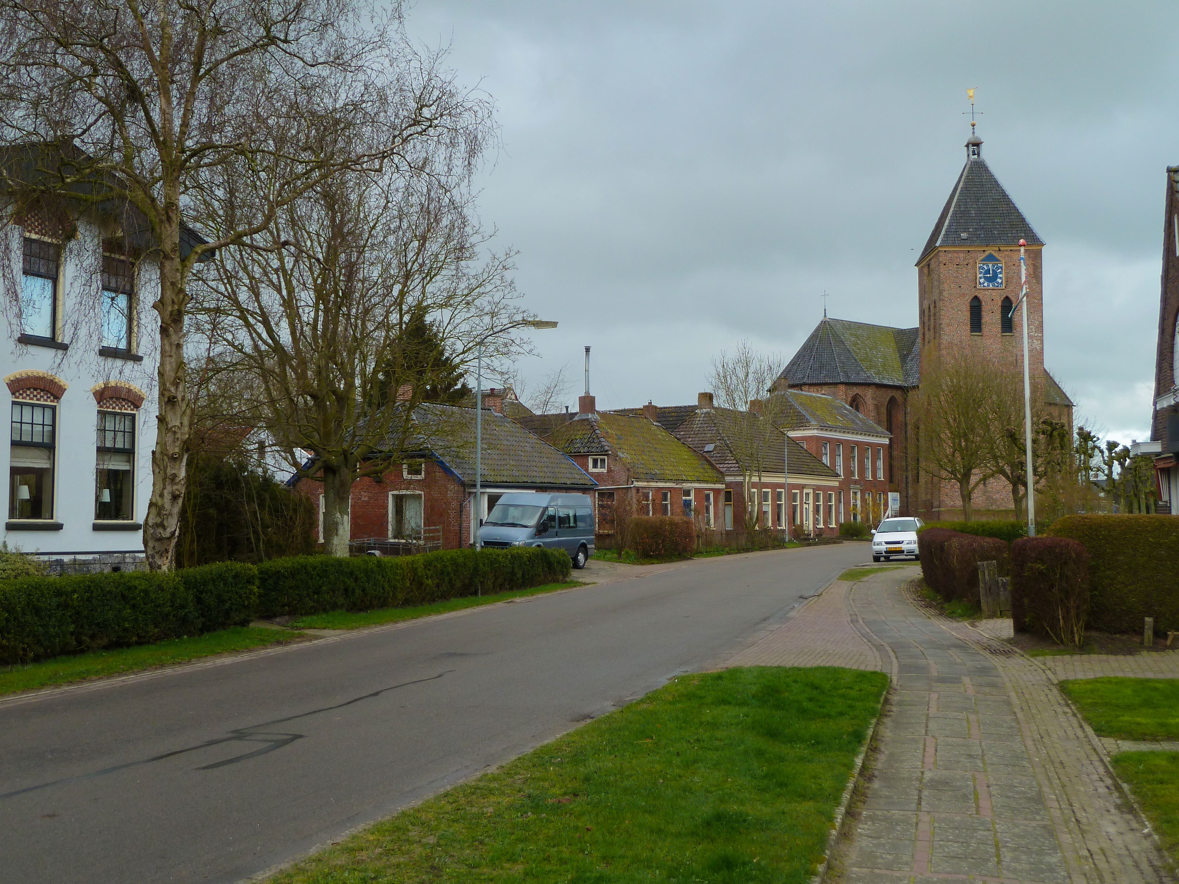 Dorpsgezicht Zeerijp langs Borgweg richting Jacobuskerk.